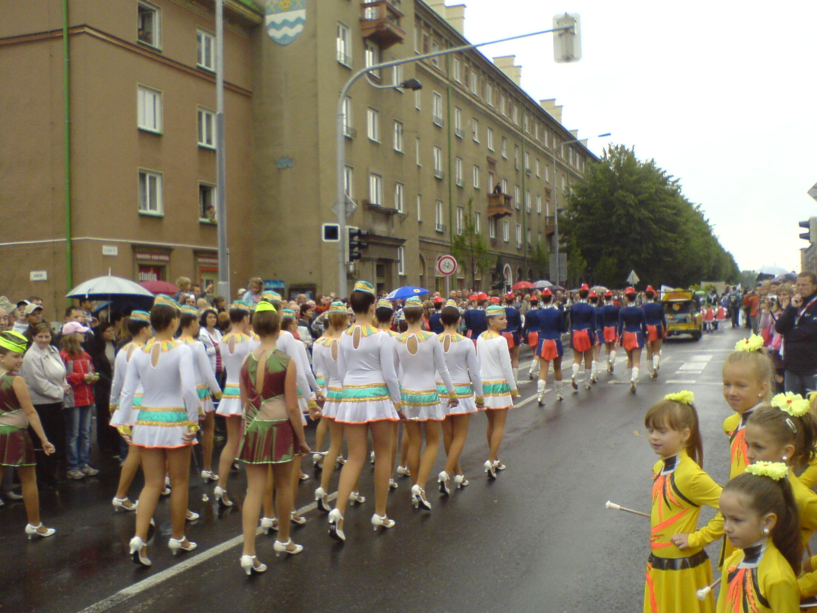 Mažoretky na křižovatce Hlavní třídy a ulice Gorkého (Havířov v květech 2009)